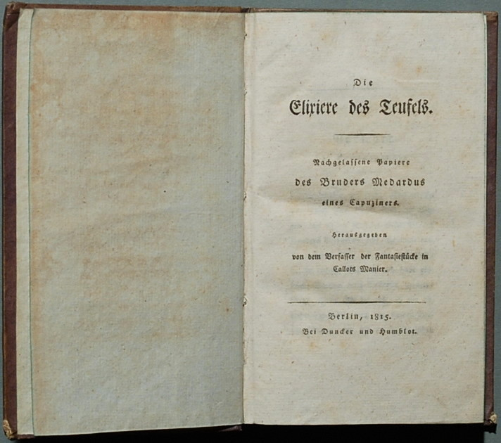 Hoffmann, E. T. A.: Die Elixiere des Teufels. Nachgelassene Papiere des Bruders Medardus / eines Capuziners. Herausgegeben von dem Verfasser der Fantasiestücke in Callots Manier. Berlin: Duncker und Humblot 1815. Erstausgabe/Erstdruck (Wilpert/Gühring² 5)